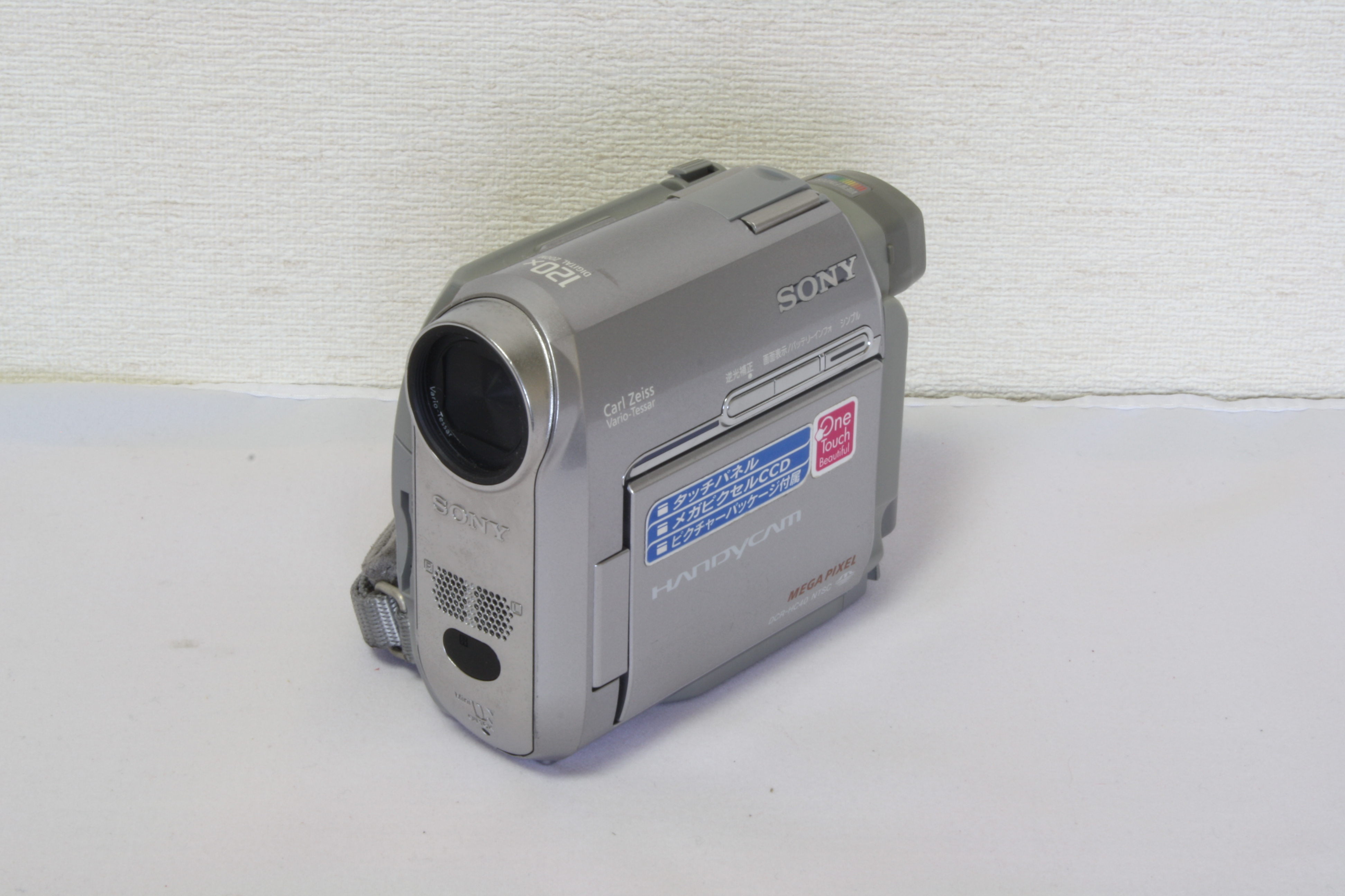 SONY DVカメラ。DCR-HC40